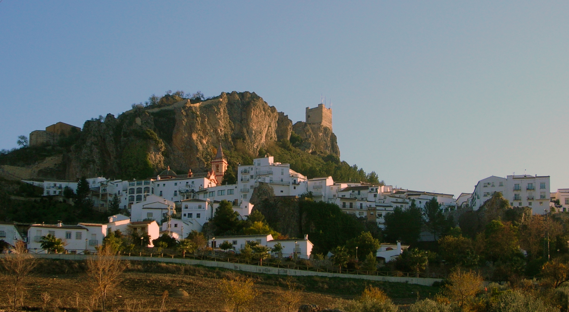 Zahara de la Sierra, Andaloucía (España)